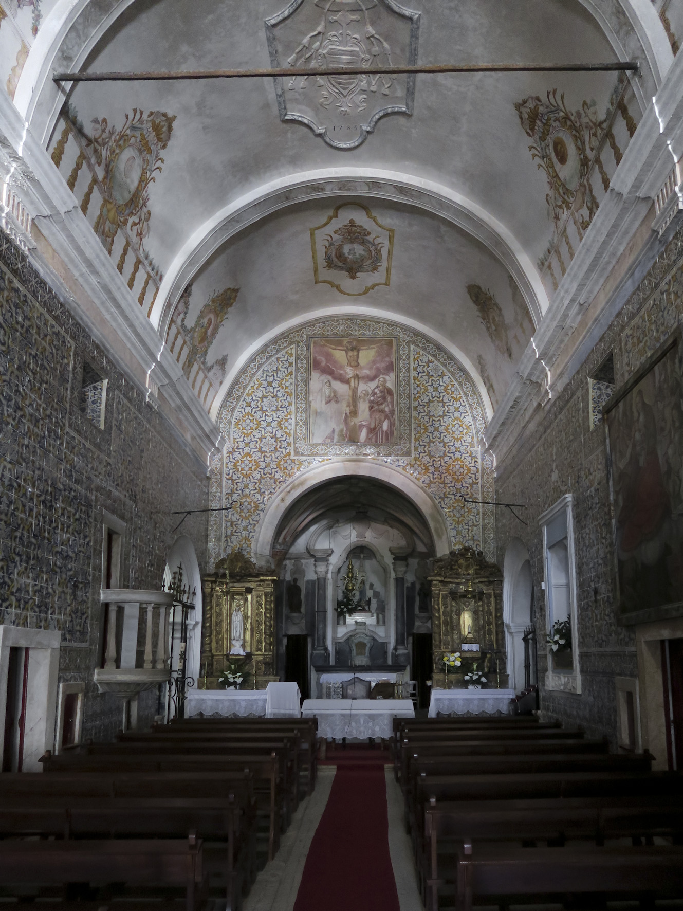 Igreja Matriz de Brotas